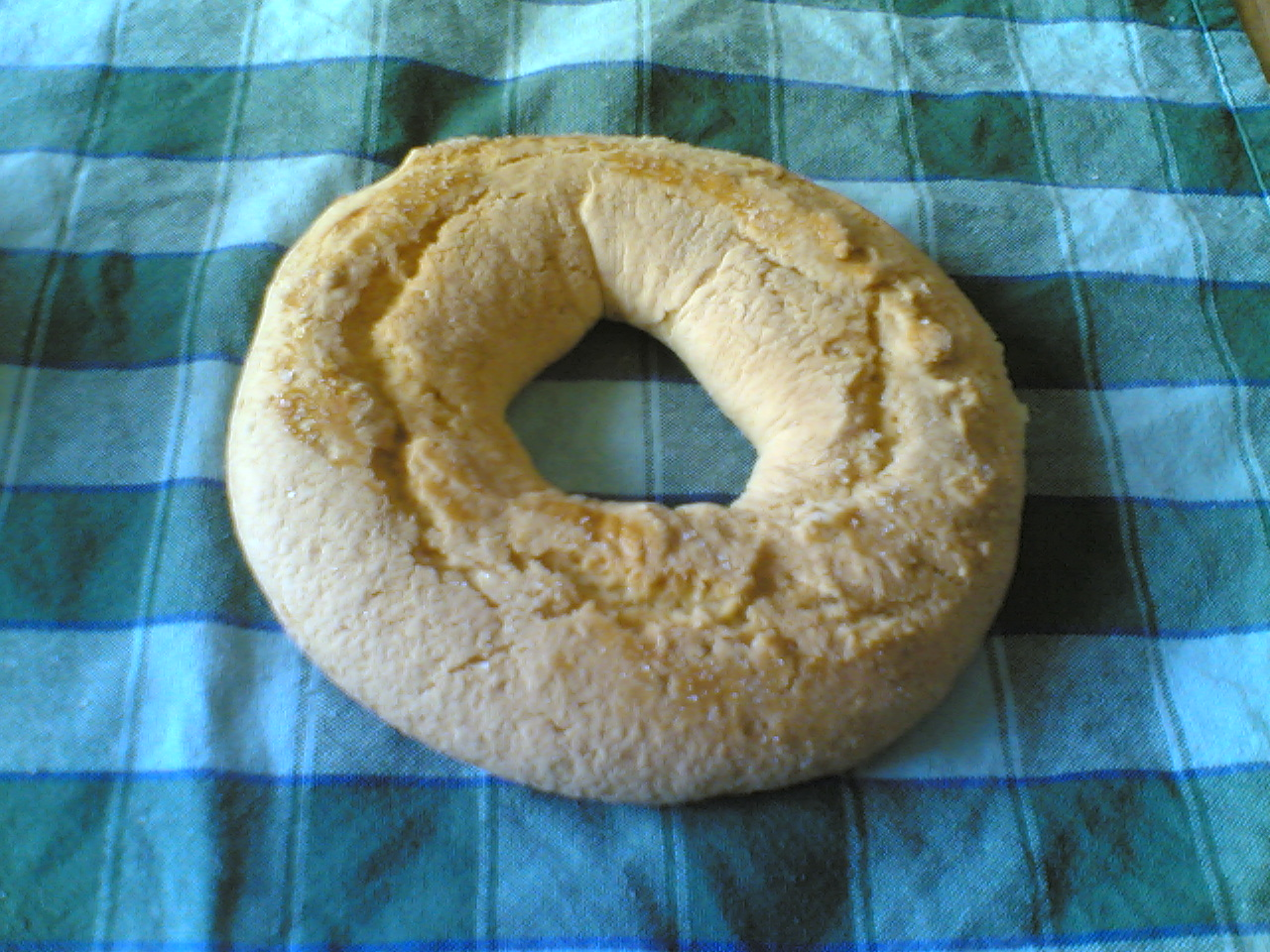 Ciambellino tradizionale di Rigomagno (Traditional Ciambellino from Rigomagno)